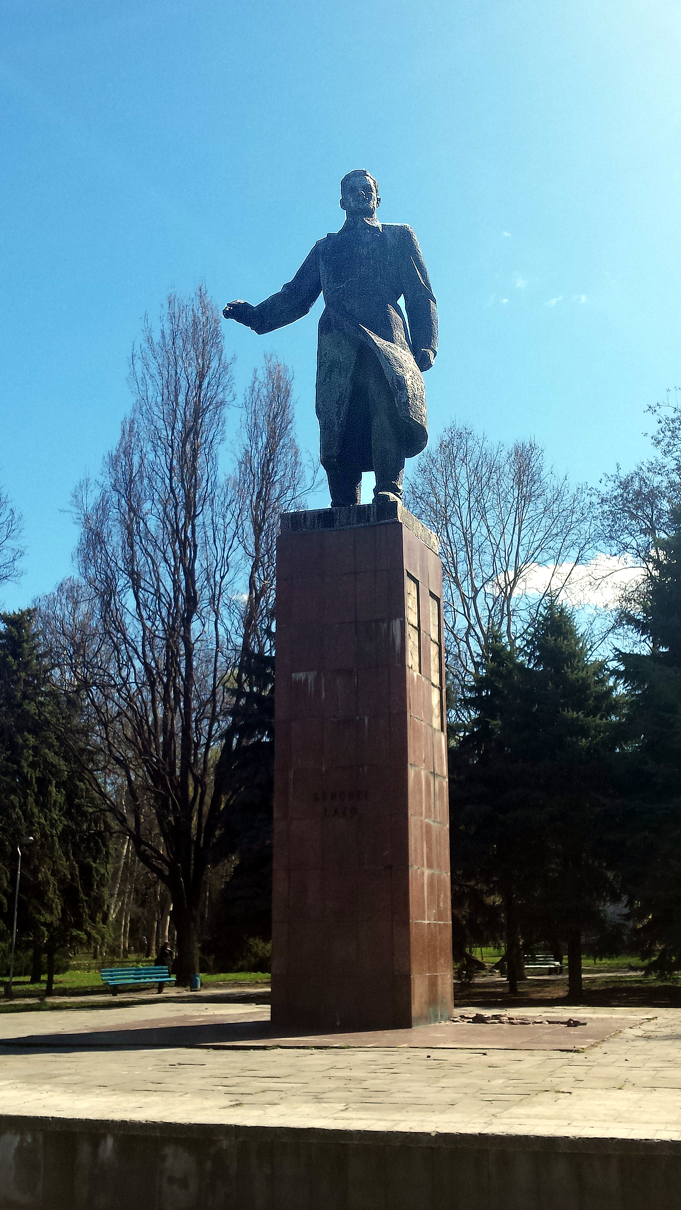 Monumentul lui Serghei Lazo din Chișinău